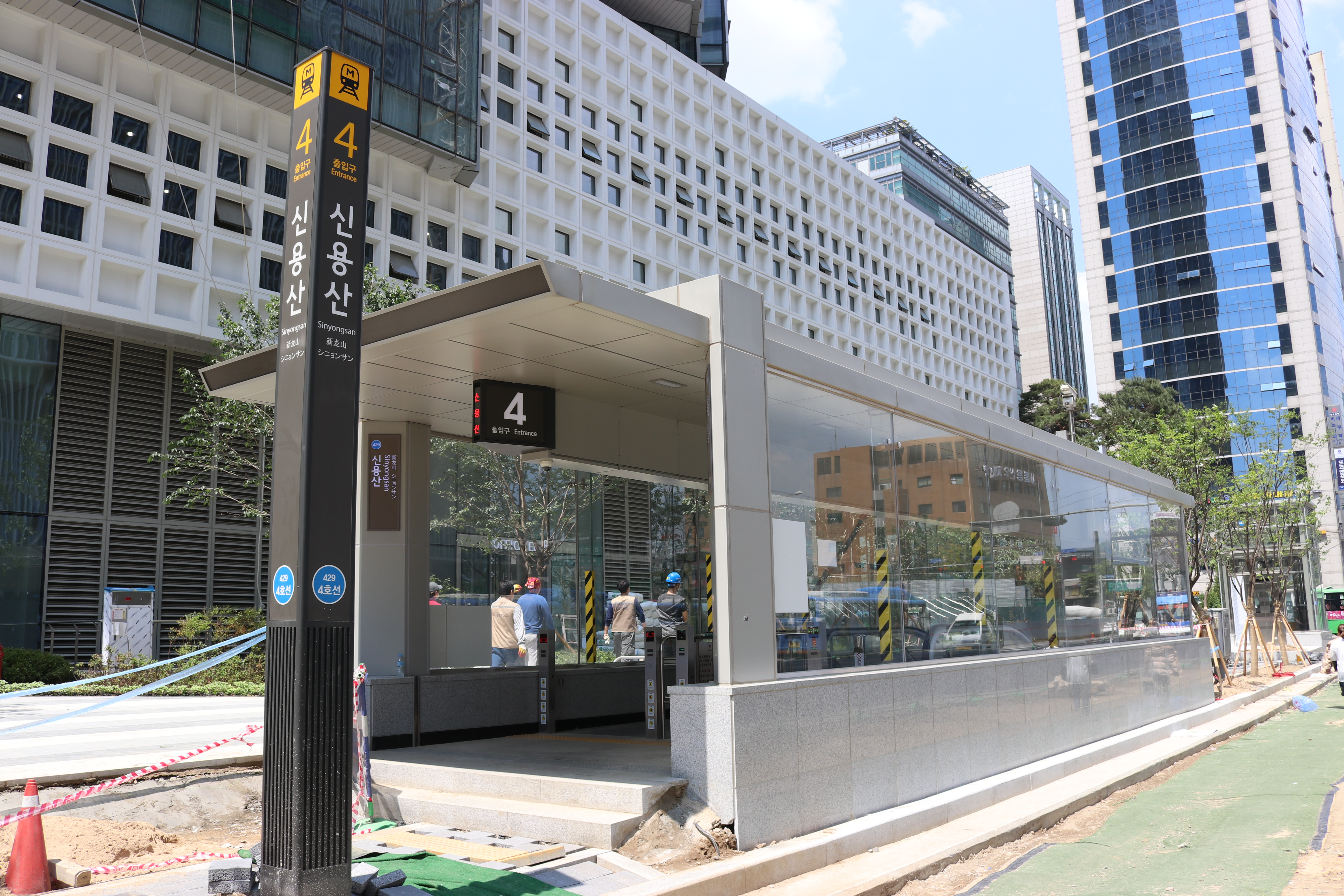 신용산역 4번 출입구